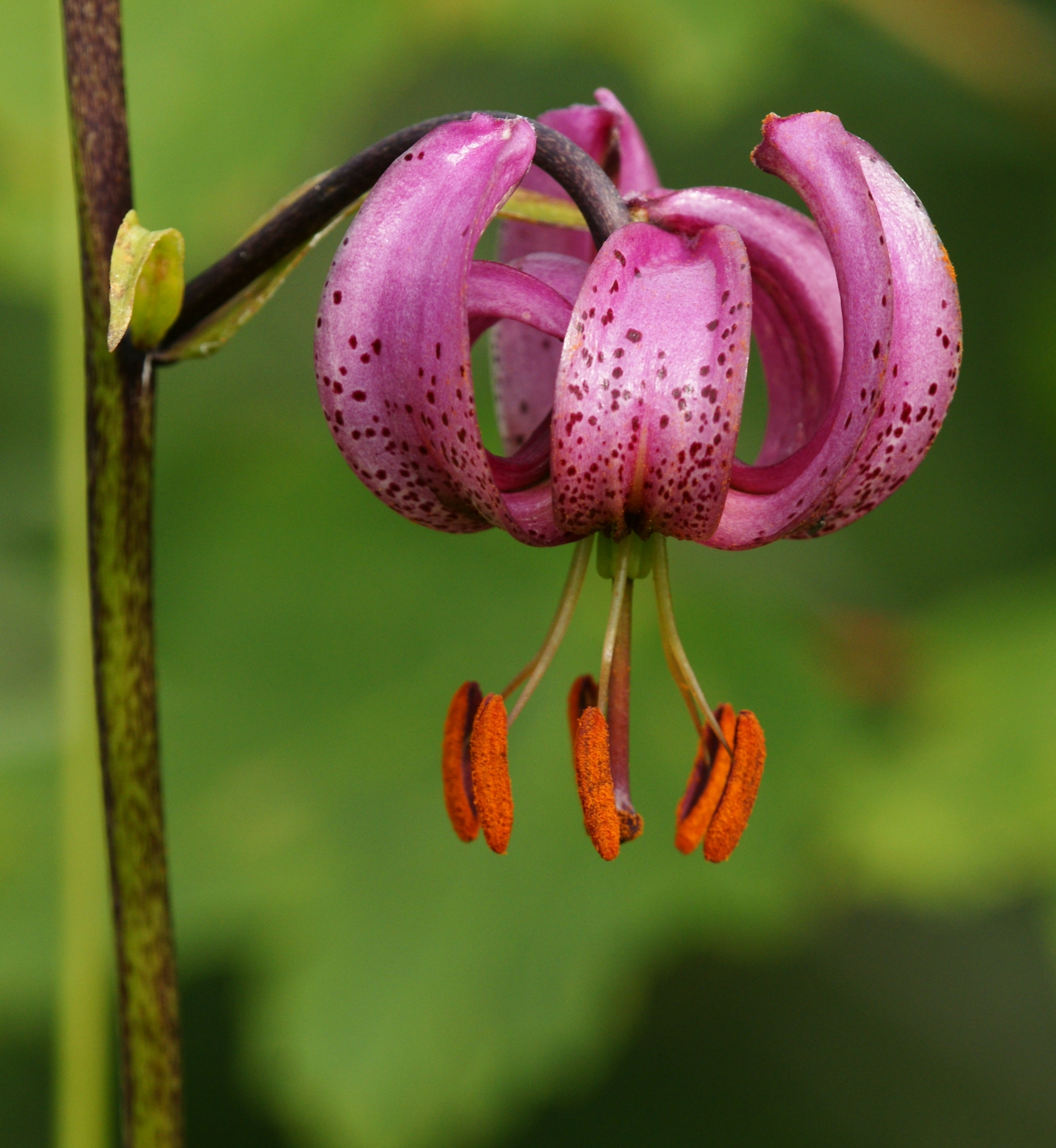 Lilium martagon